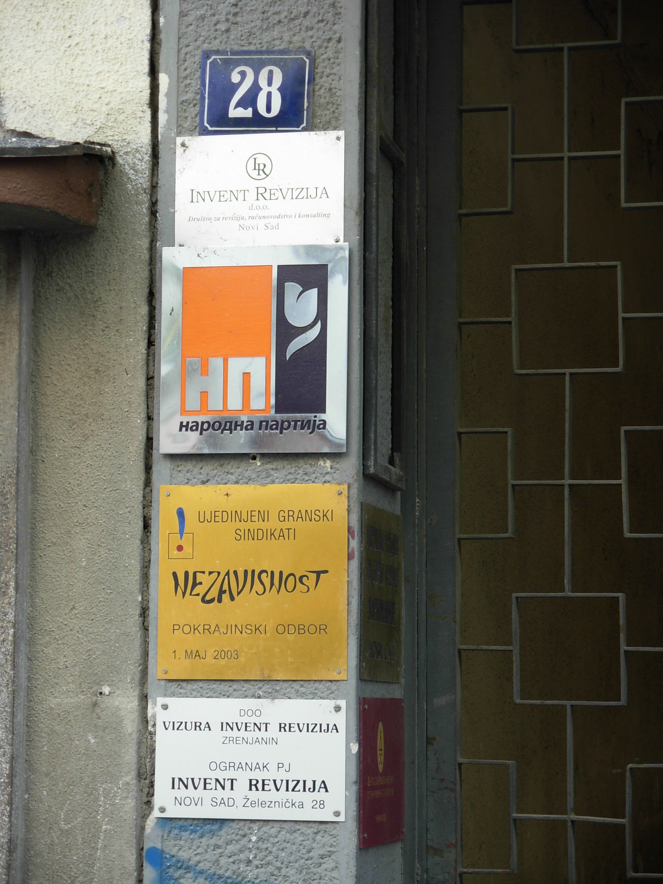 Table na zgradi u Novom Sadu u kojoj se nalazi sedište Narodne partije i Pokrajinskog odbora Samostalnog granskog sindikata Nezavisnost.